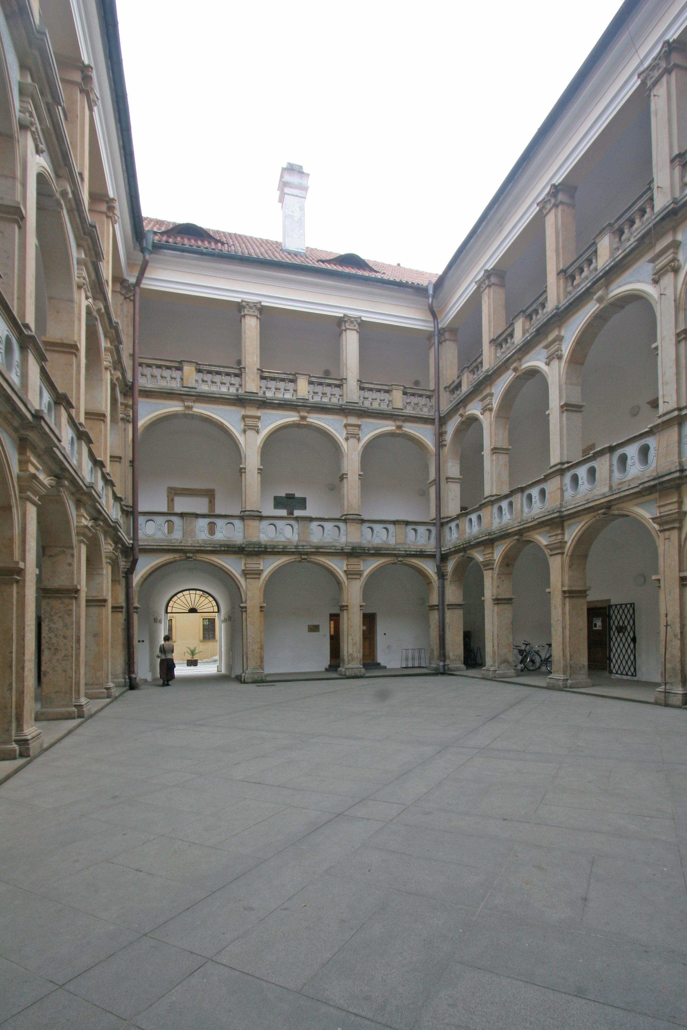 zámek, Valdštejnovo nám. 1, Jičín